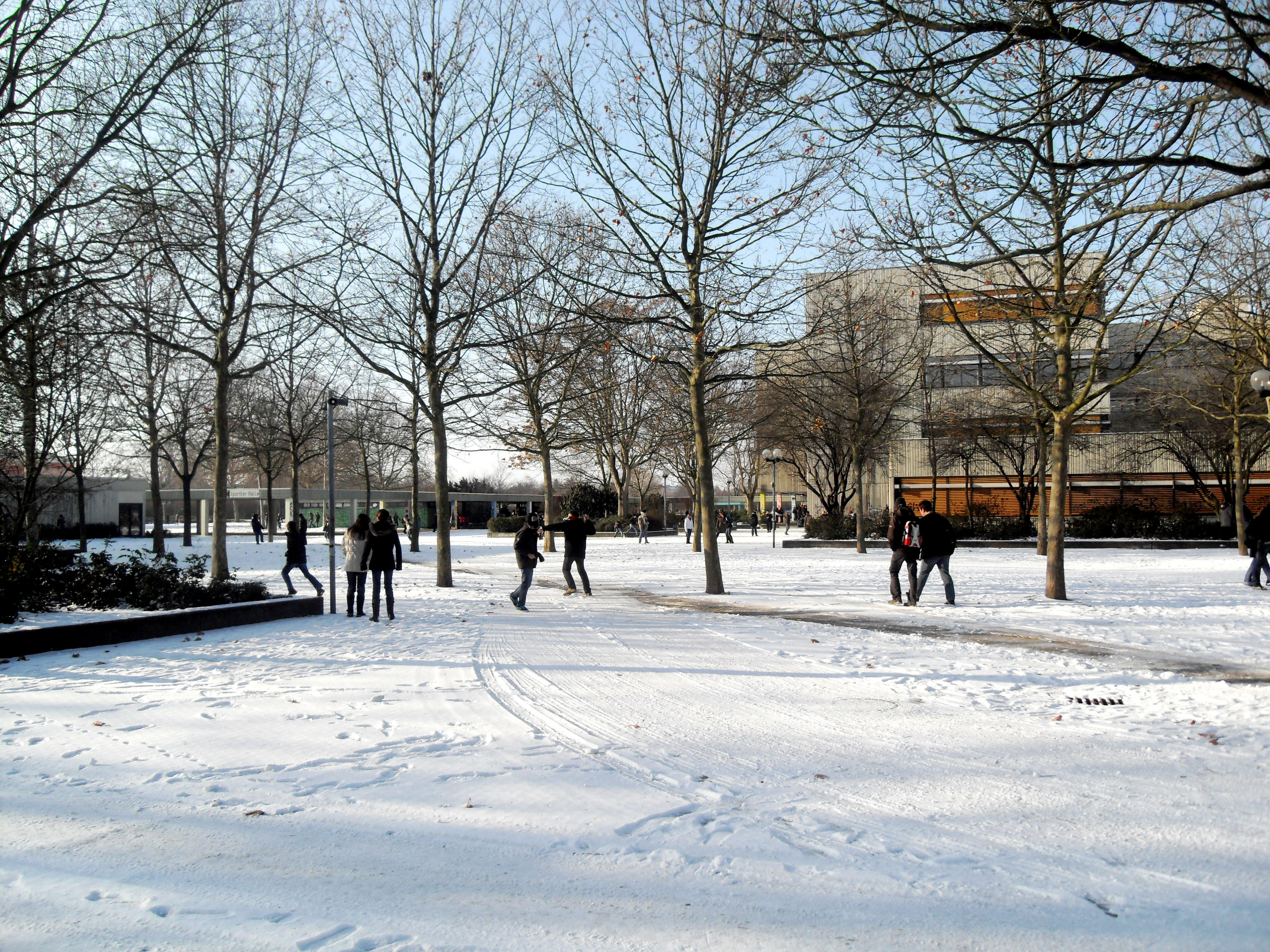 Der Schulhof der Wormser Gymnasien Gauß- und Rudi-Stephan-Gymnasium in Rheinland-Pfalz (Deutschland)